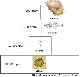 Ecological Pyramid